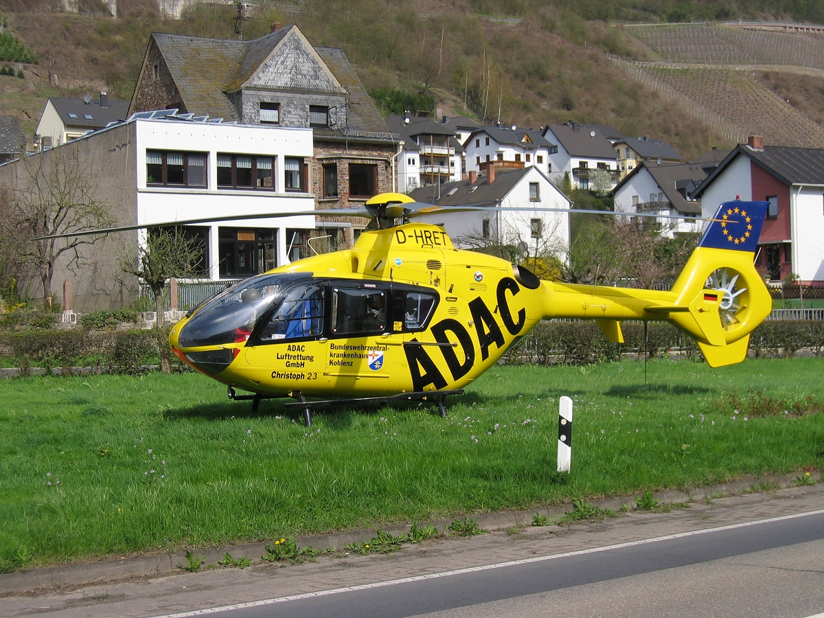 CHR 23 Außenlandung